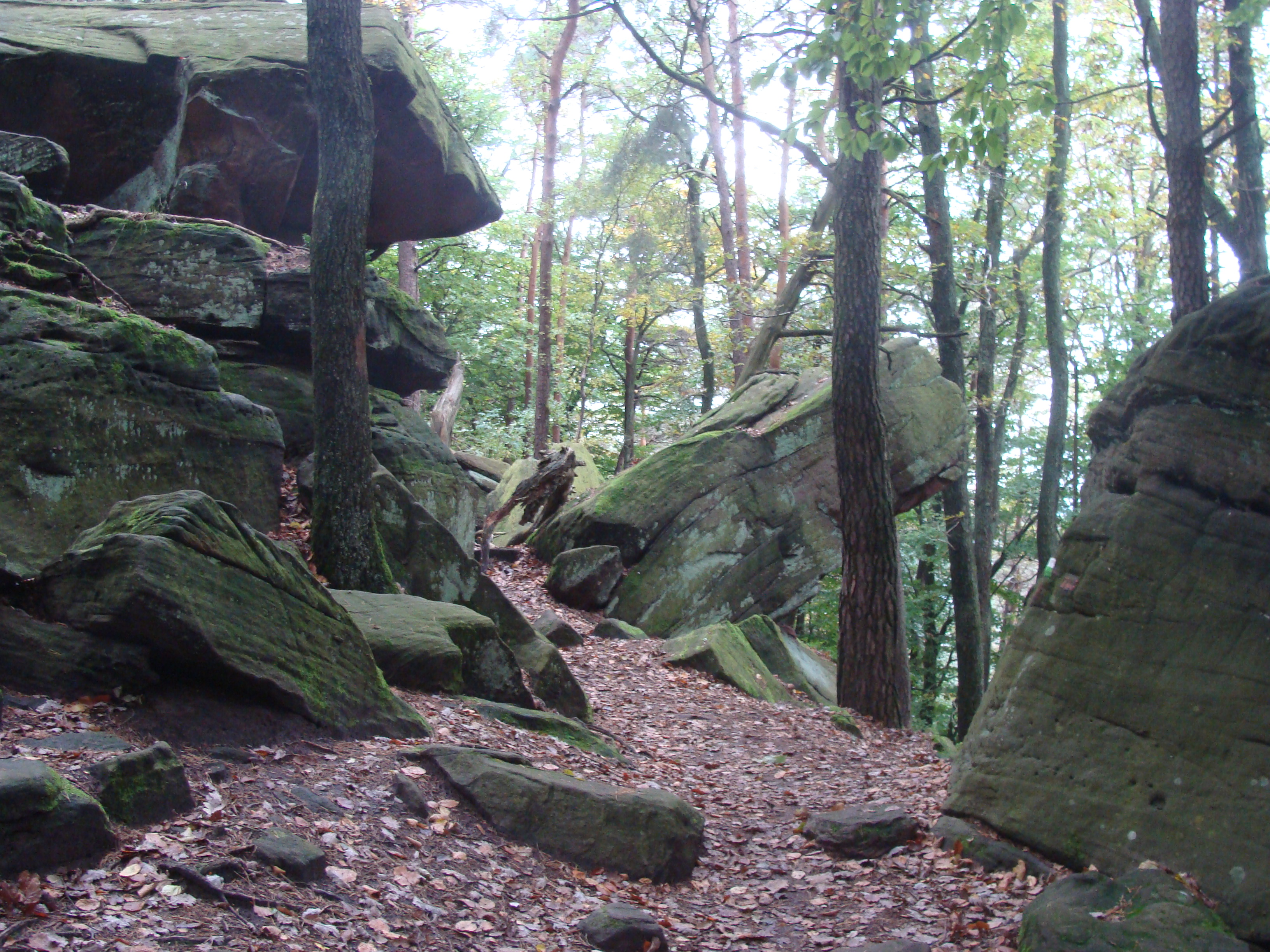 Felsenmeer am Hüttenberg (Kalmitmassiv im Haardt/Pfälzerwald)